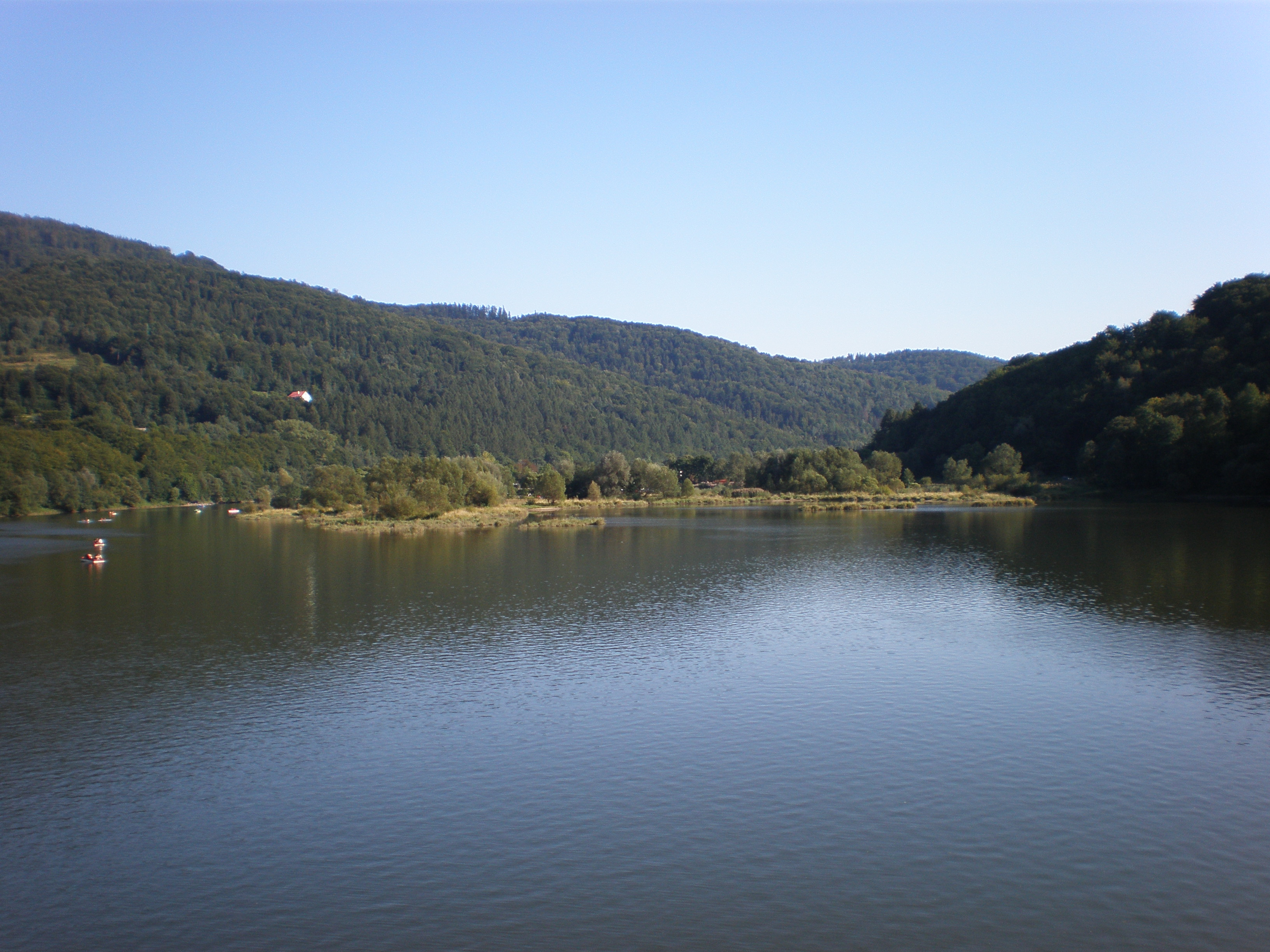 Jezioro Międzybrodzkie